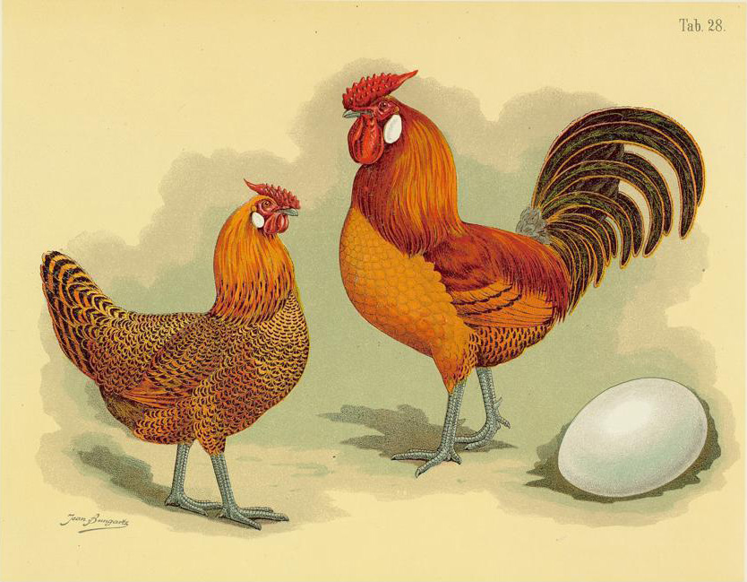 Hamburger-Huhn. Gallus dom. hamburgieus. Hamburghs. Poule de Hamburg.